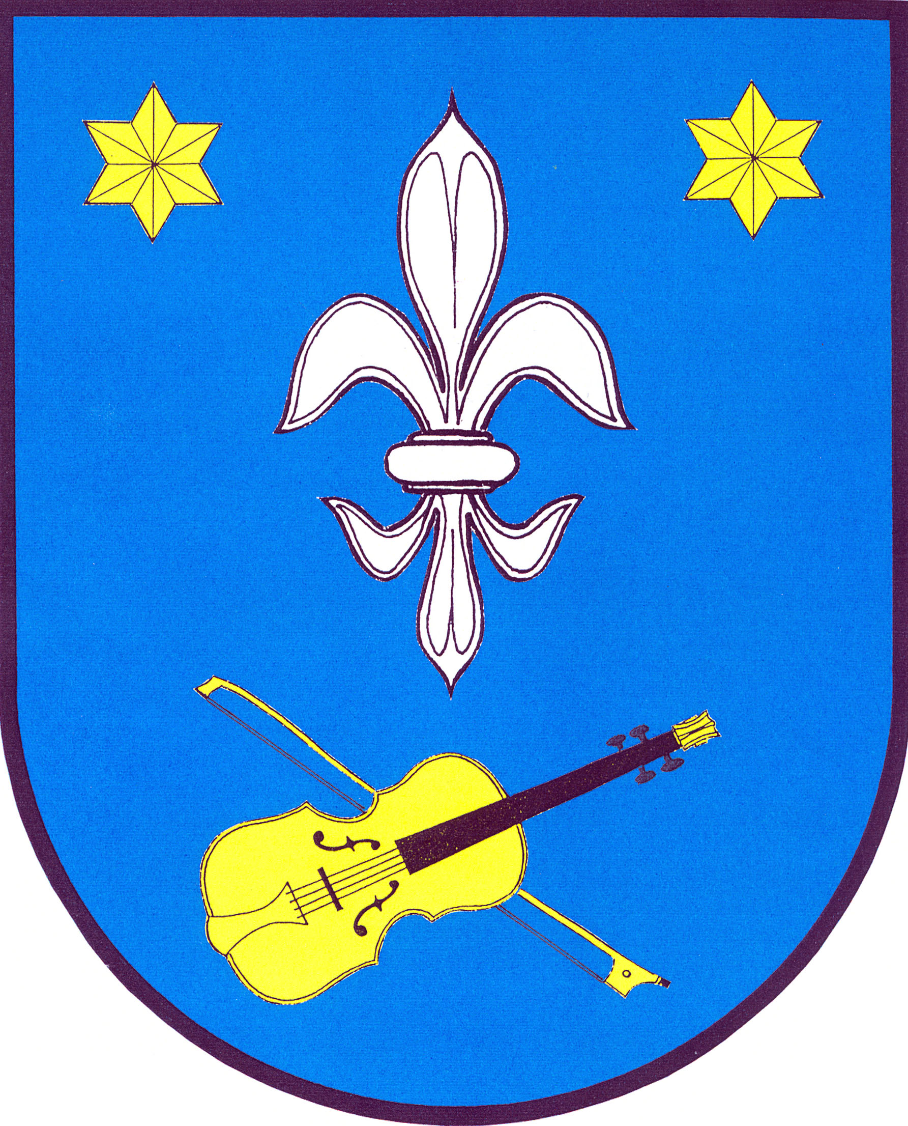 Znak obce Býchory